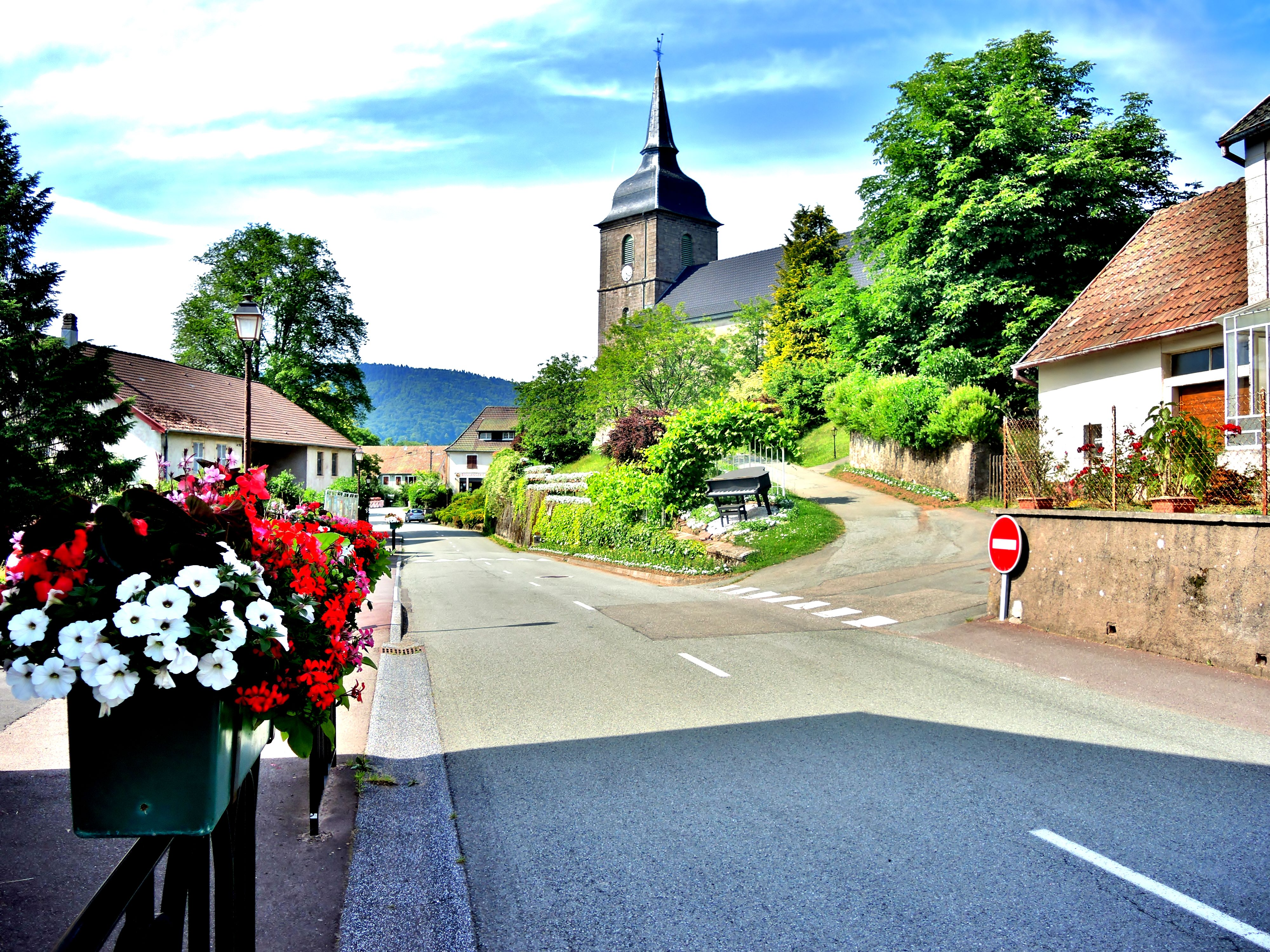 Rue des écoles, à Rougegoutte. Territoire de Belfort